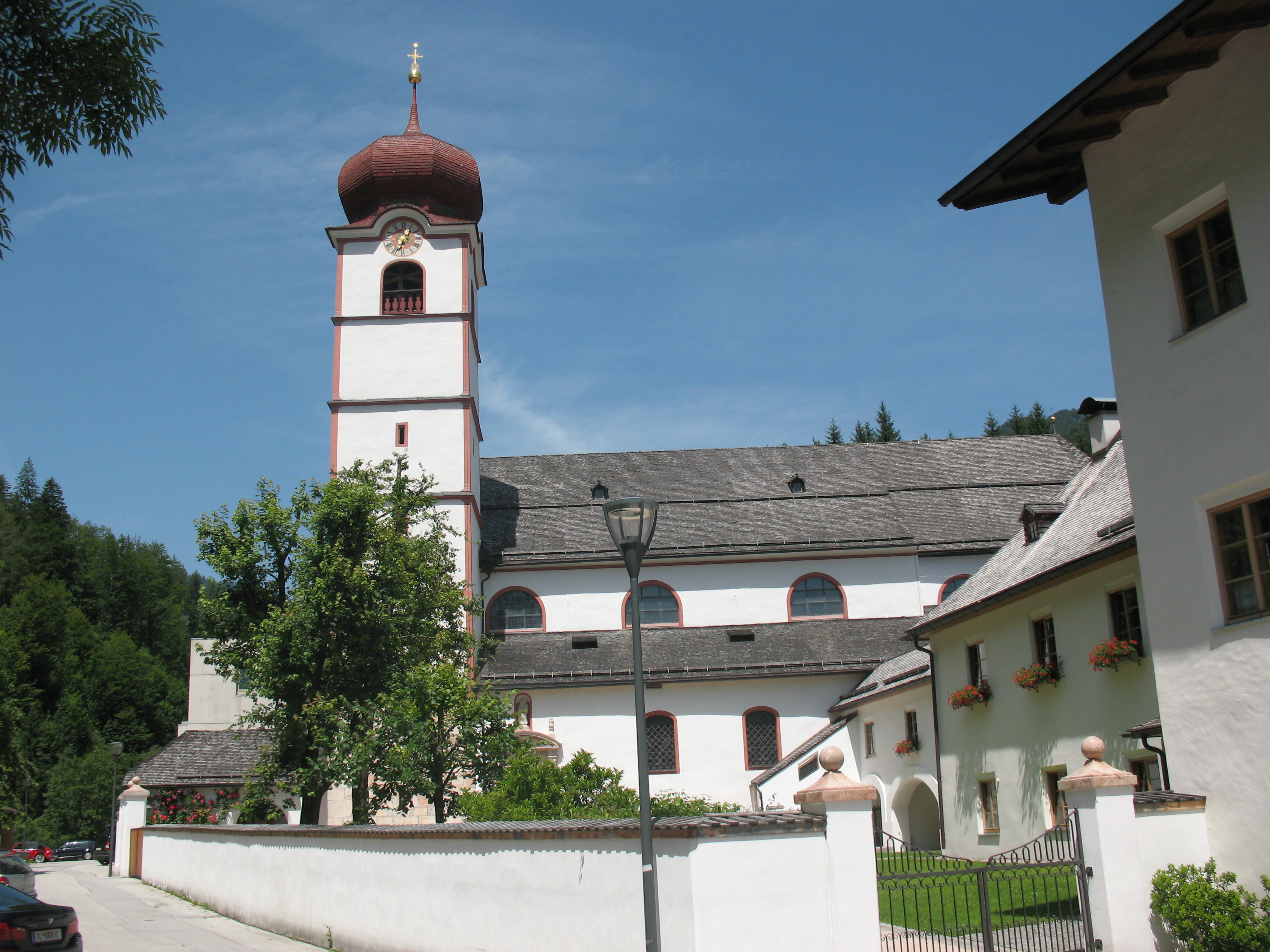 Pfarr- und ehem. Dominikanerinnenkirche hl. Dominikus, Reste der Vorgängerbauten sowie Friedhof mit Kapelle